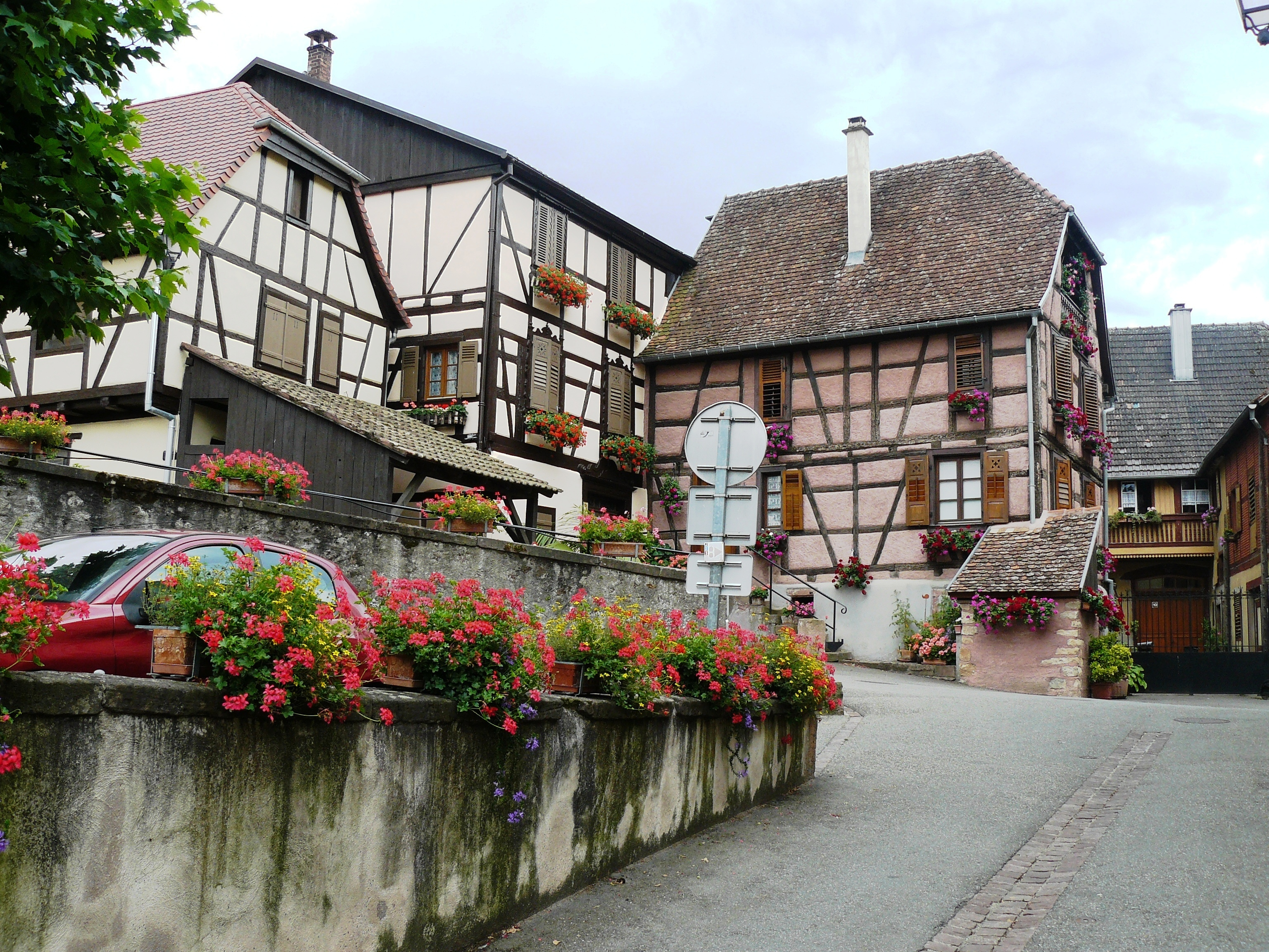 Les maisons à colombages à Hunawihr